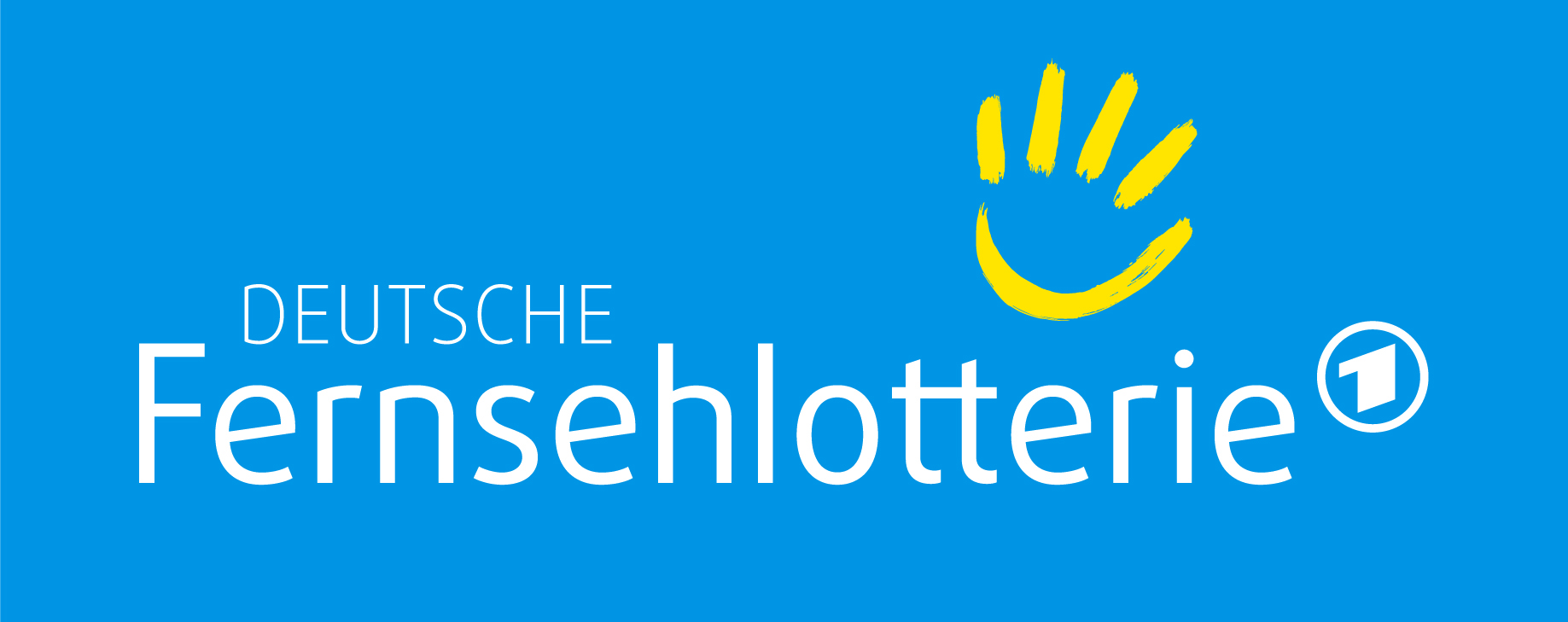 Logo seit 2017